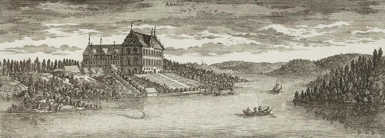 Biskops-Arnö i Suecia antiqua et hodierna - volume 1